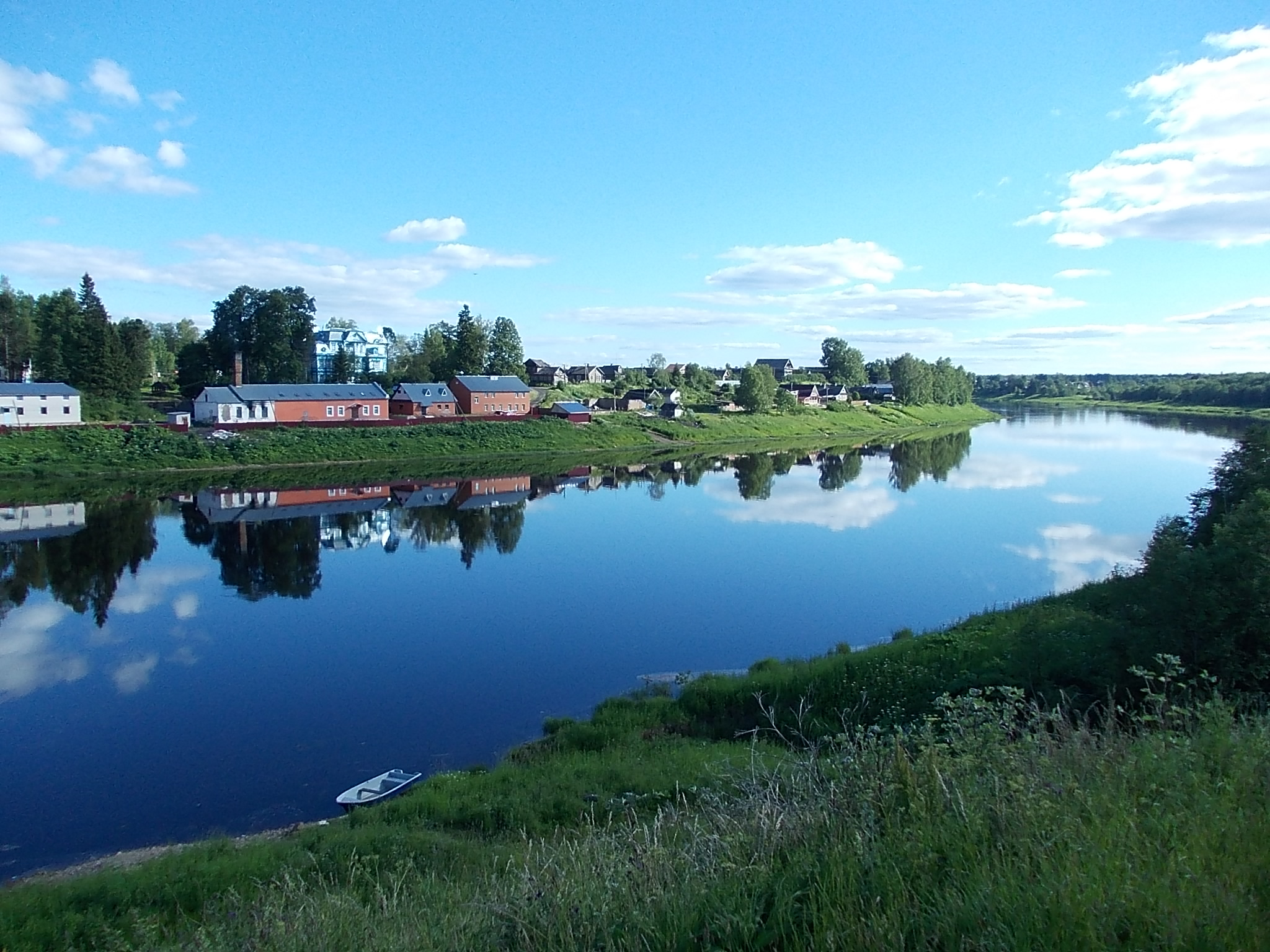 Река Сясь